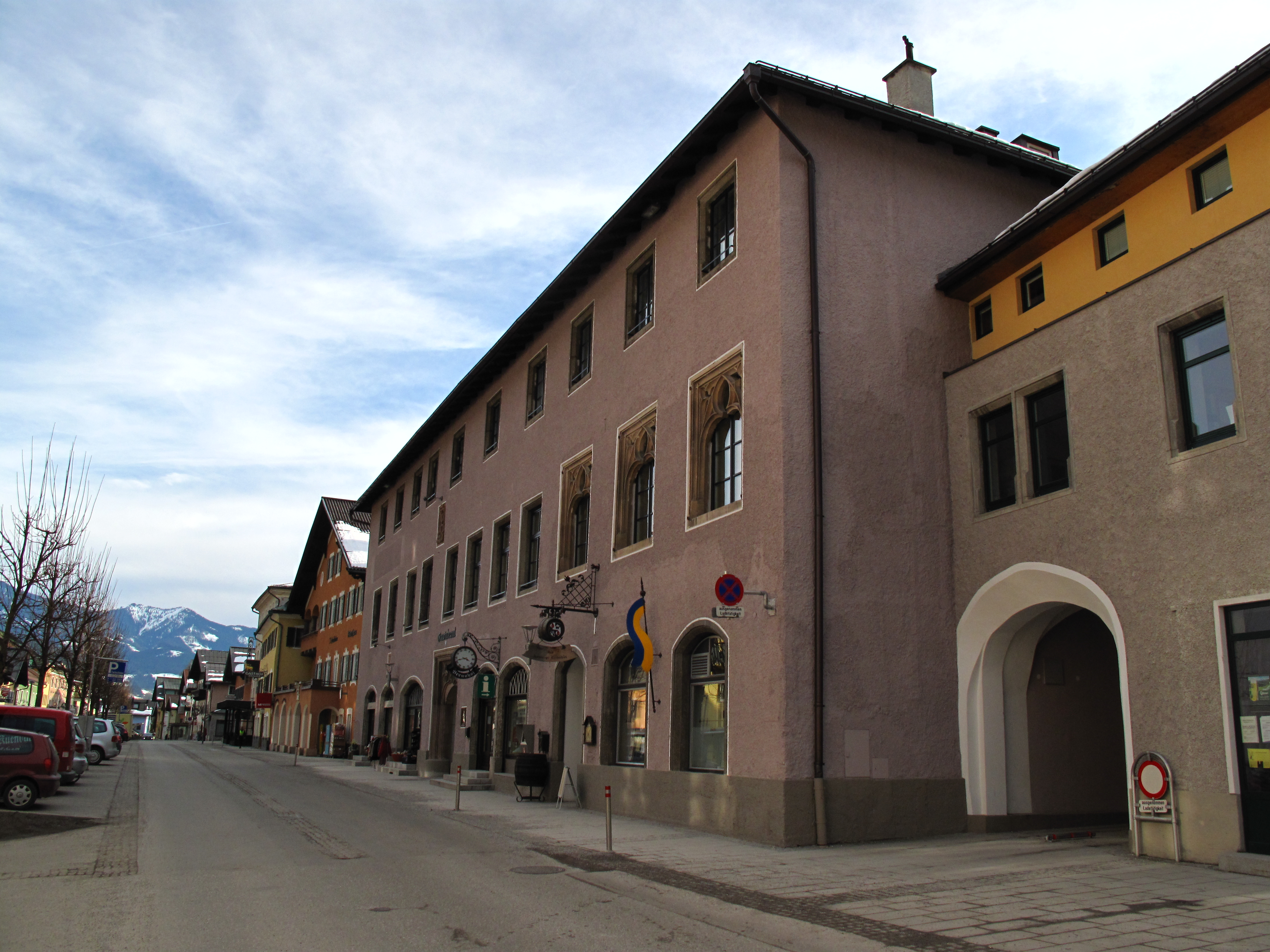 Gemeindeamt, Brennhof, 5450 Werfen, Markt 24